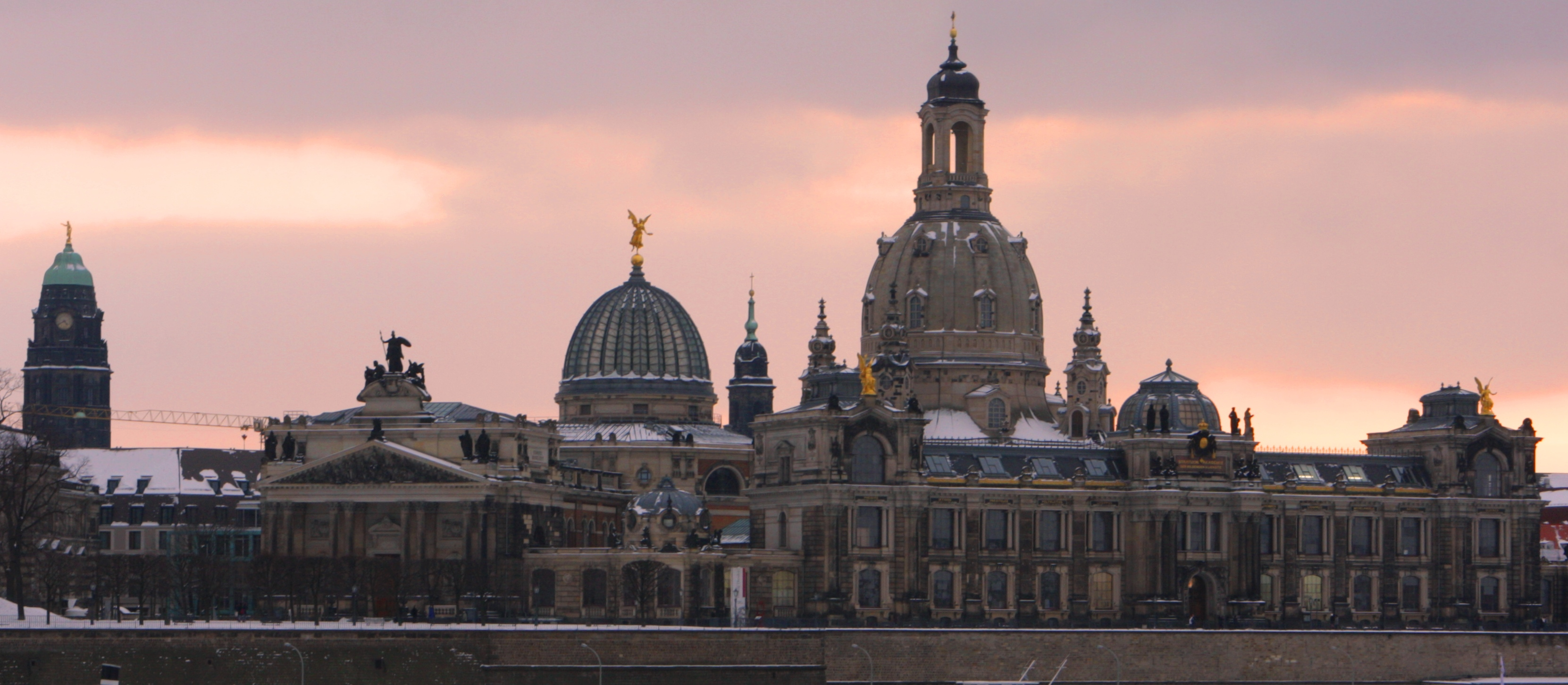 Verschneites Dresden - Altstadt Frauenkirche Kunstakademie Brühlsche Terrasse